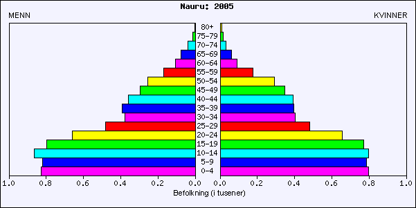 Naurus demografi.